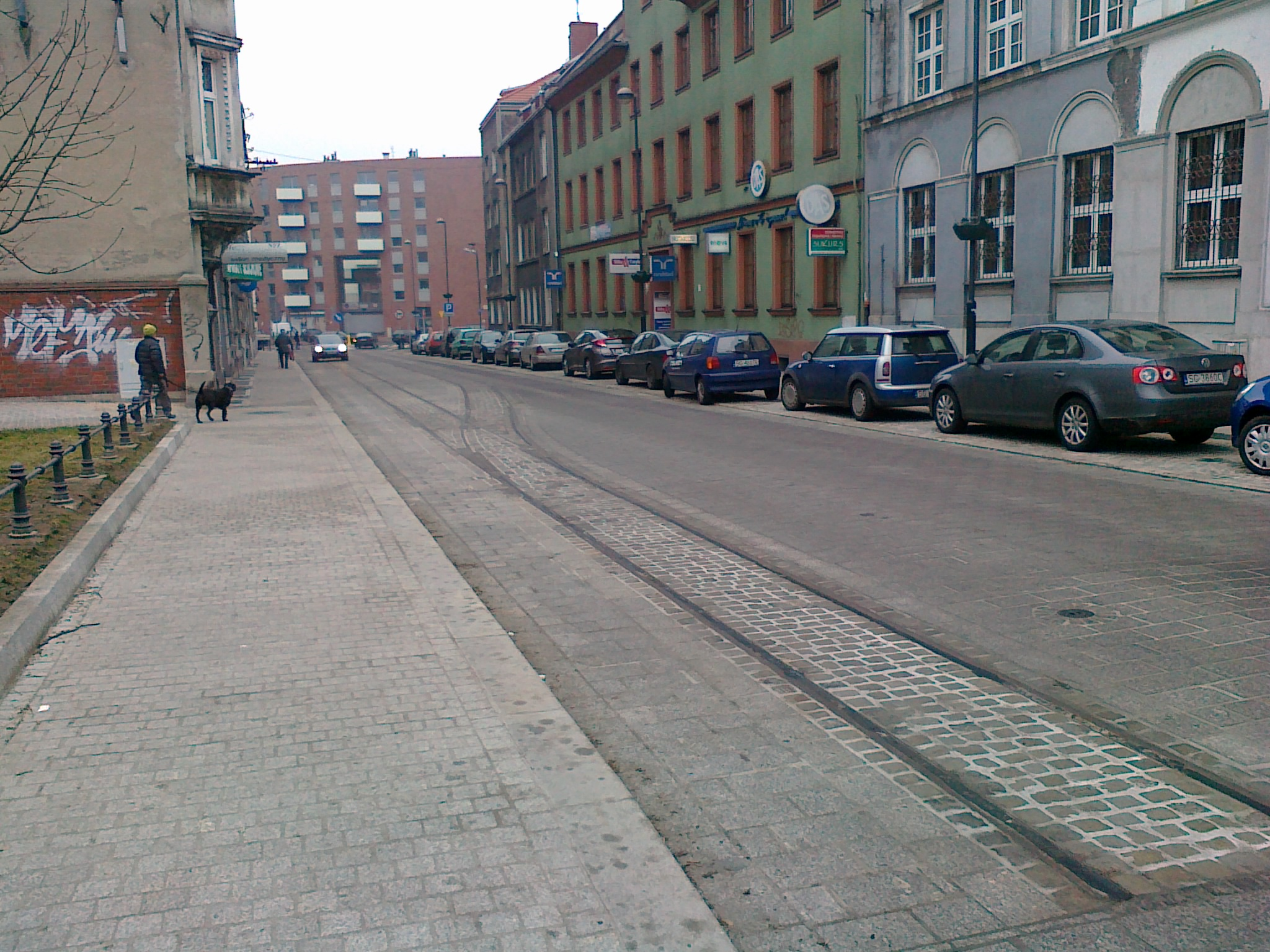 Gliwice - Wąskotorowa mijanka tramwajowa koło zamku